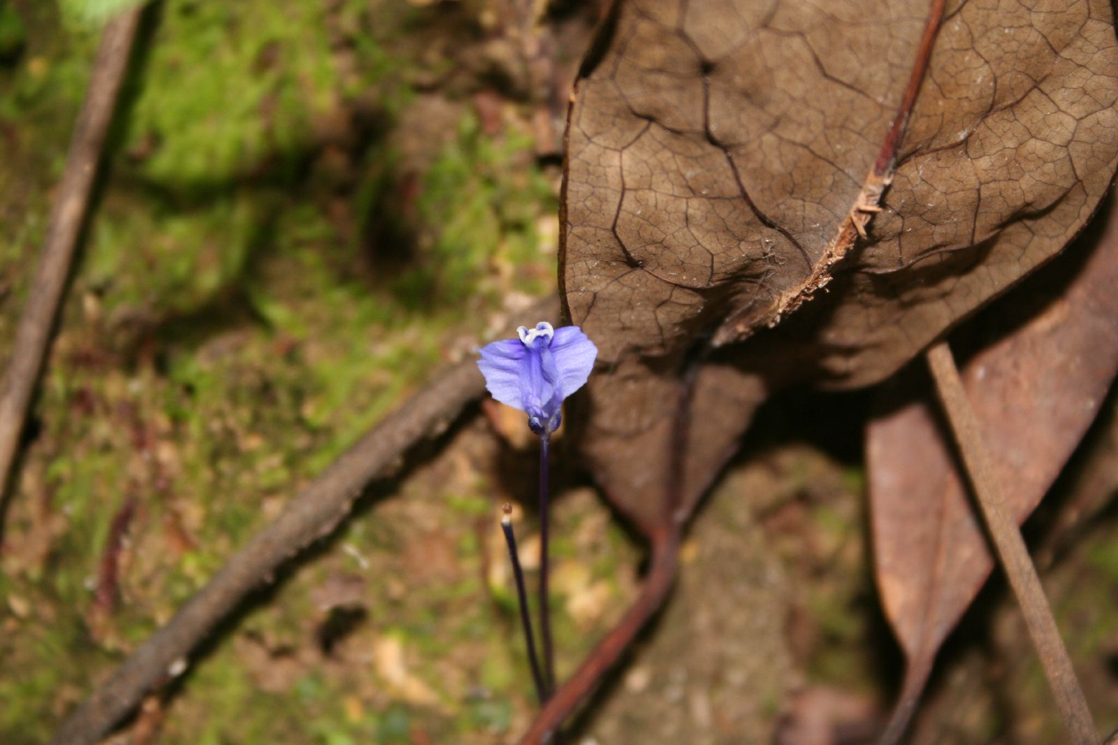 Burmannia itoana at Taipokau Nature Reserve, Hongkong